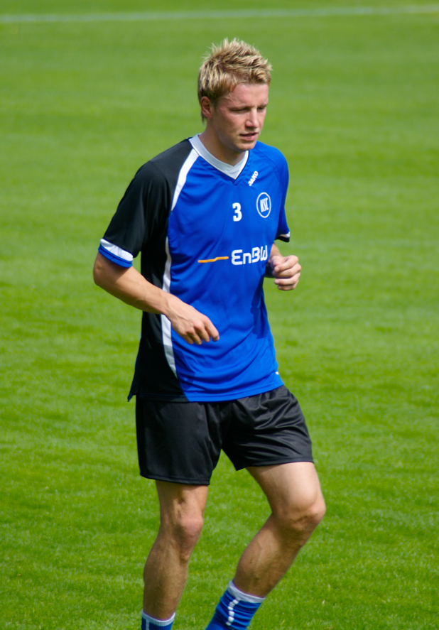 Maik Franz